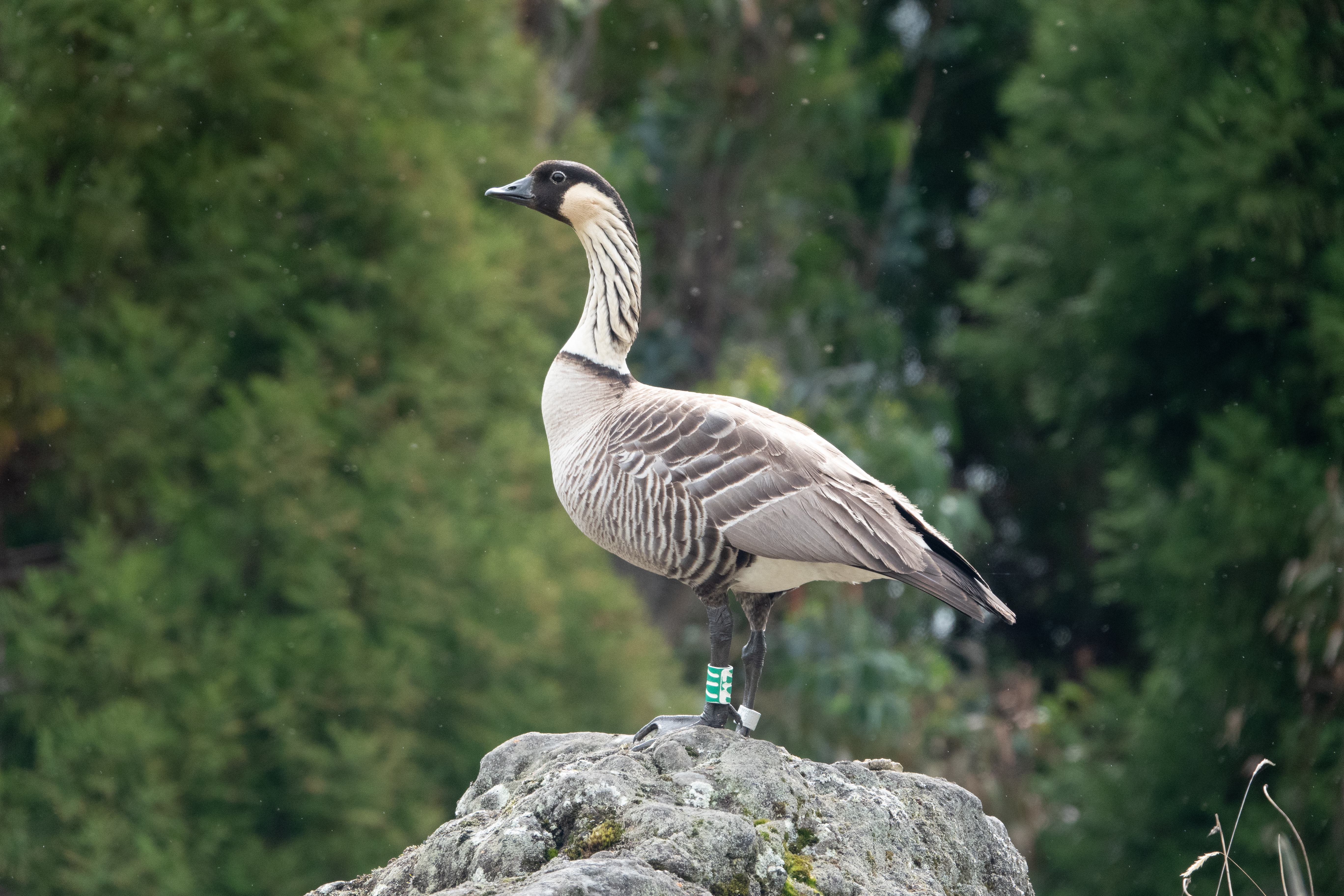 Nene or Hawaiian Goose | Hakalau NWR | HI|2018-12-02|12-53-16